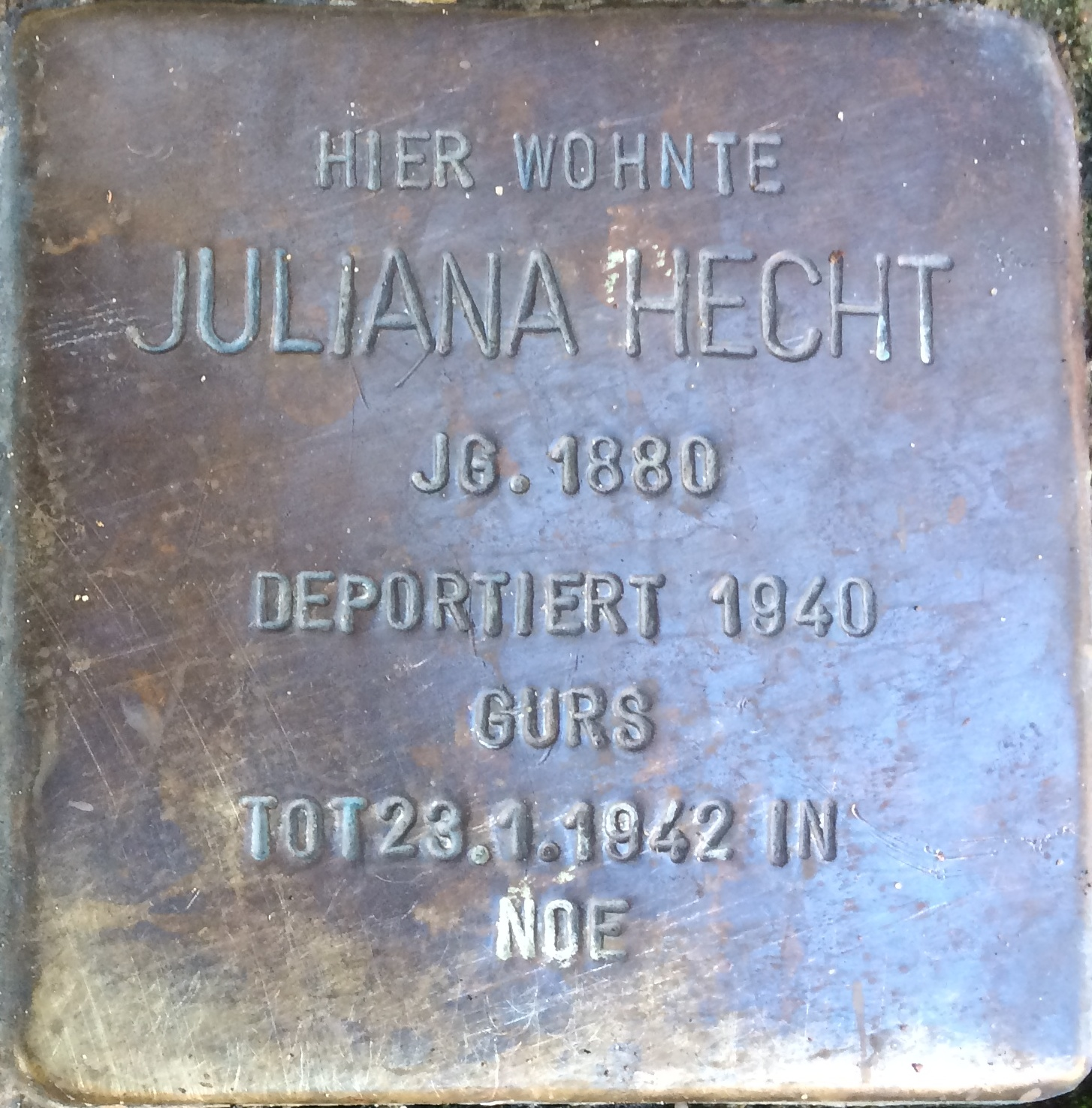 Stolperstein für JULIANA HECHT